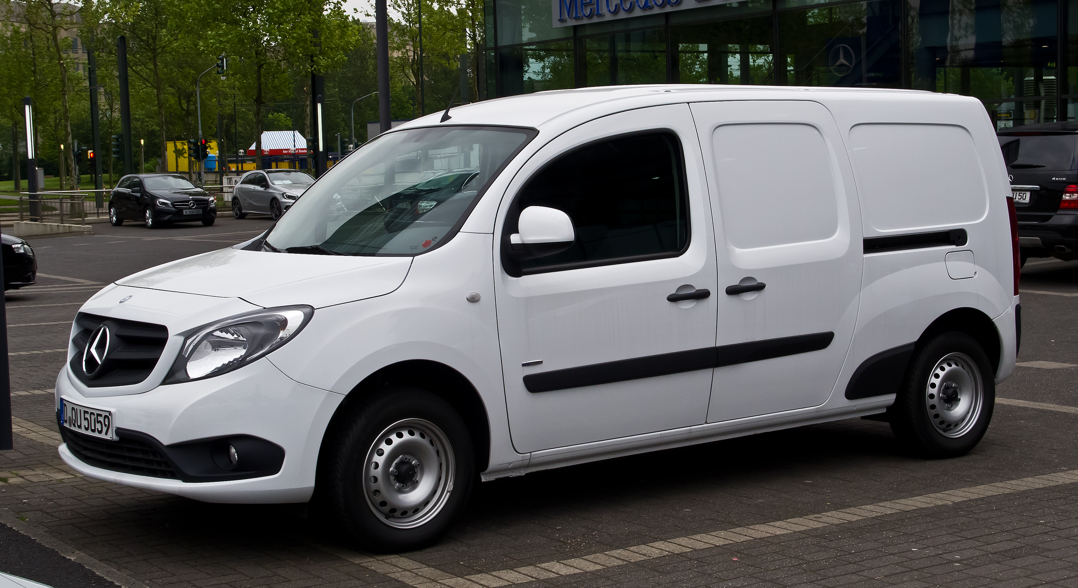 Mercedes-Benz Citan Kastenwagen Extralang 109 CDI BlueEFFICIENCY (W 415)